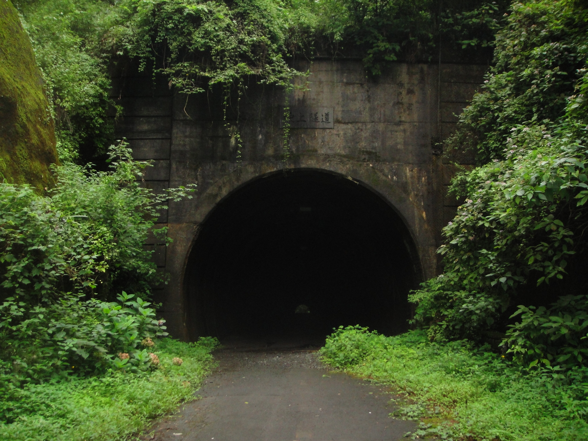 東京都青梅市成木〜黒沢の旧吹上トンネル(照明が消えた状態)